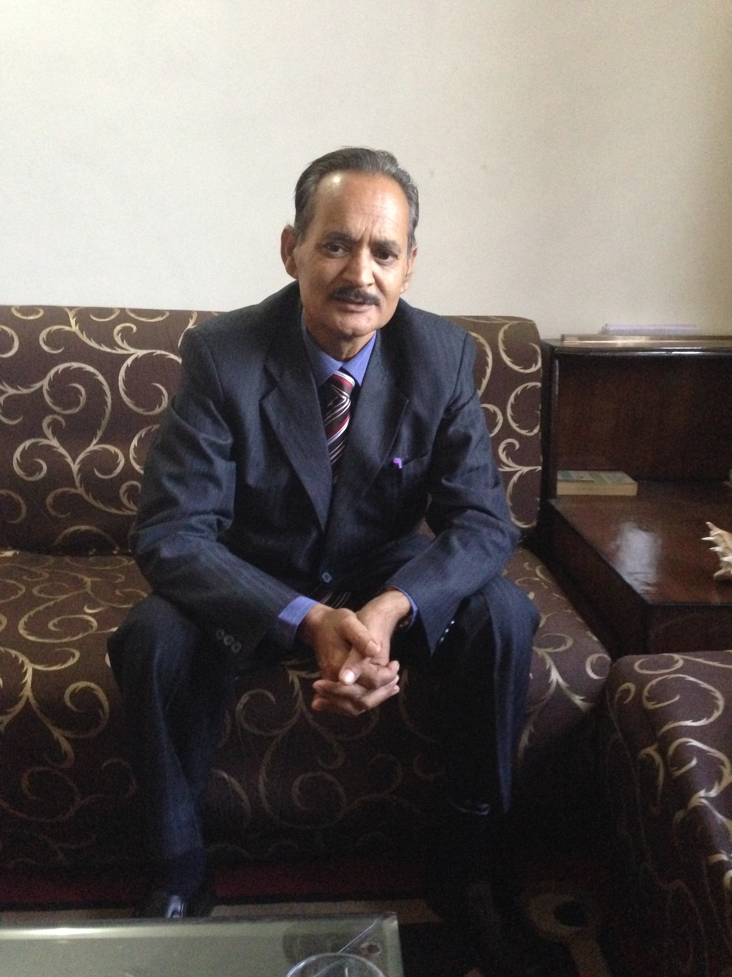 Punjabi Critic